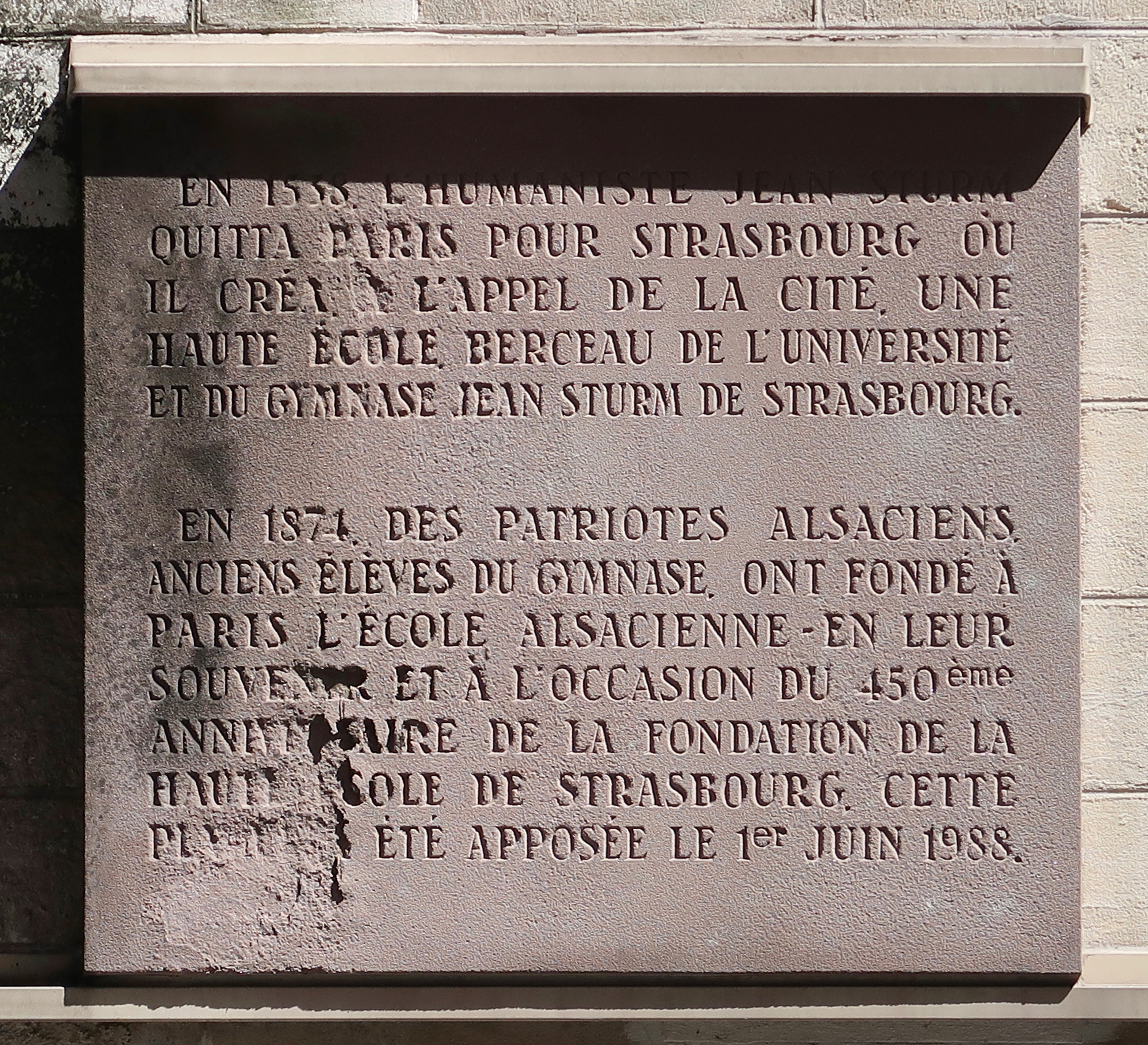 Plaque sur la façade de l'École alsacienne, 109 rue Notre-Dame-des-Champs (Paris, 6e). Mention de l'humaniste Jean Sturm.